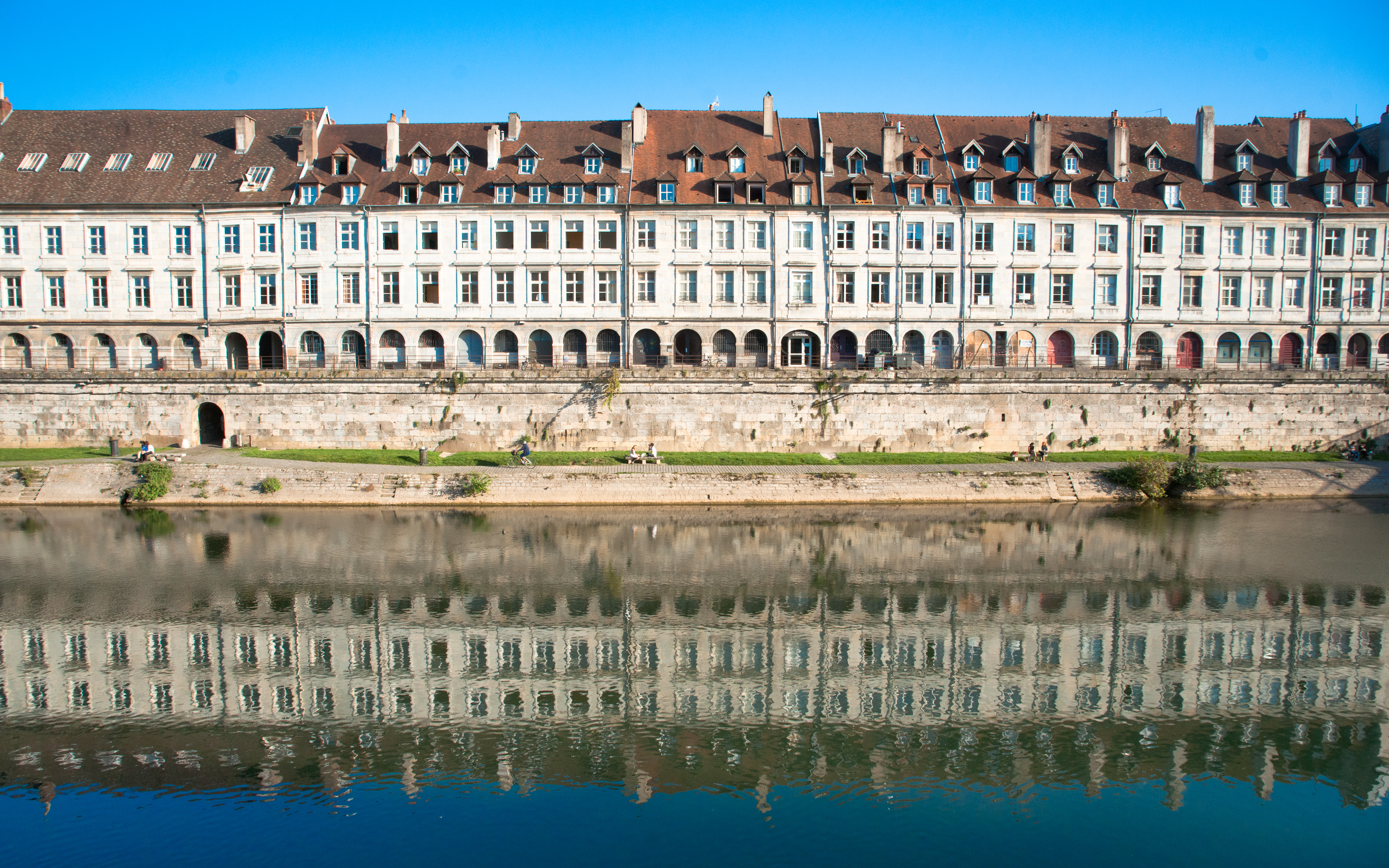 Le quai Vauban à Besançon, Doubs, France. Différents bâtiments classés ainsi que l'ancien grenier de la ville de Besançon sur la gauche.